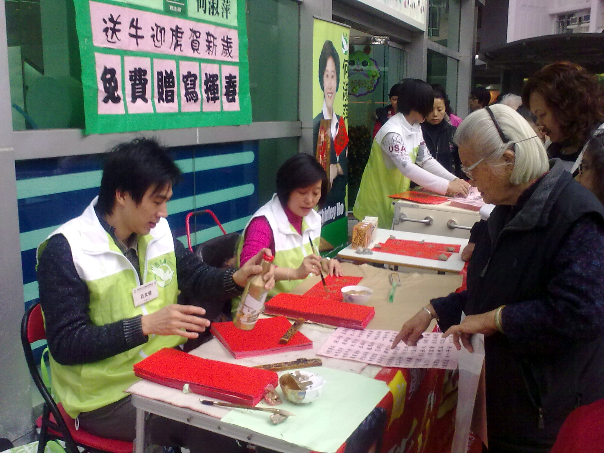 中文（香港）: 何淑萍